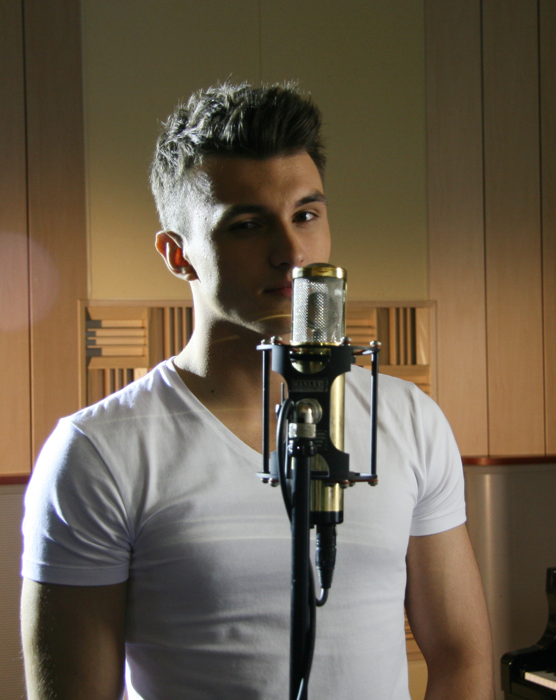 Rafal Majewski